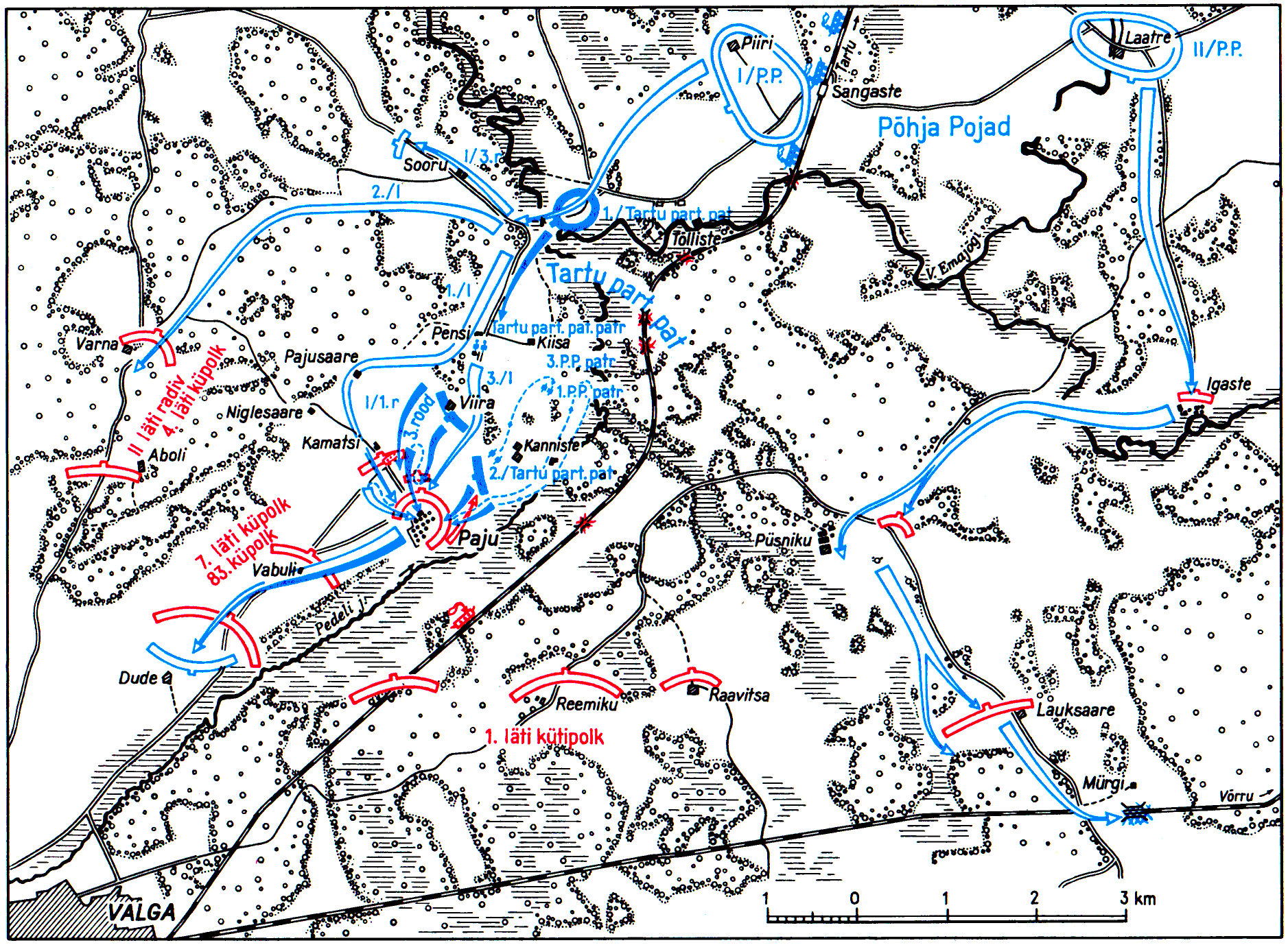 Paju lahing 31. jaanuaril 1919